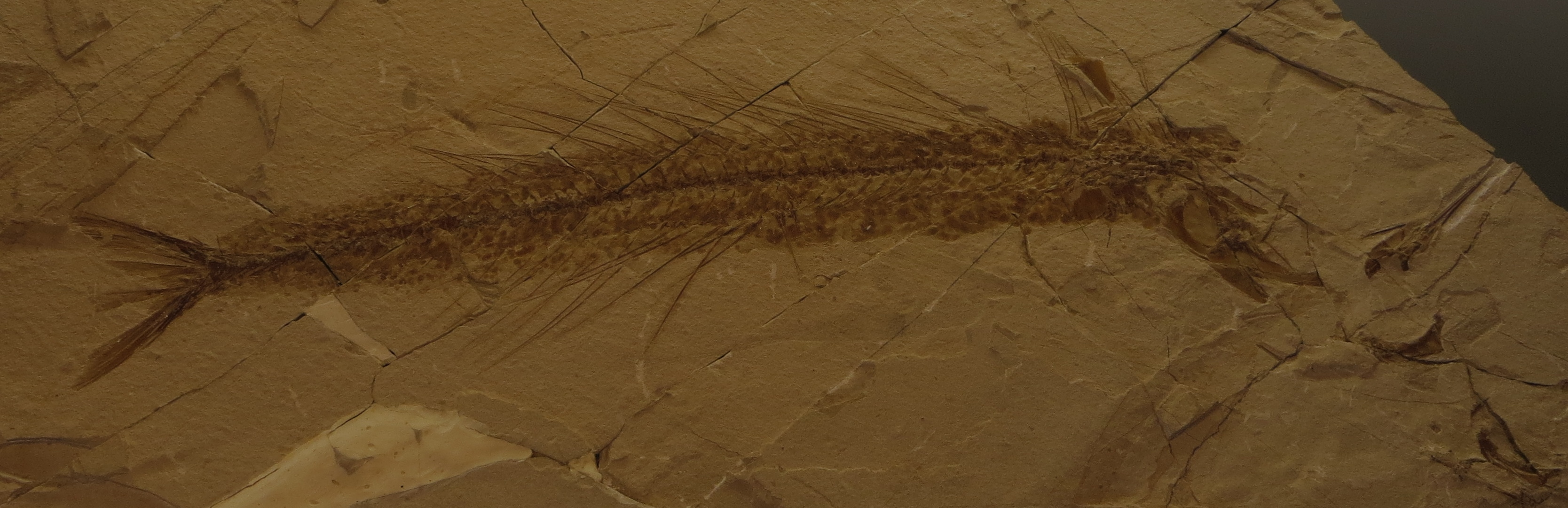 Fossil of Palaeorhynchus- Museo dei Fossili di Bolca